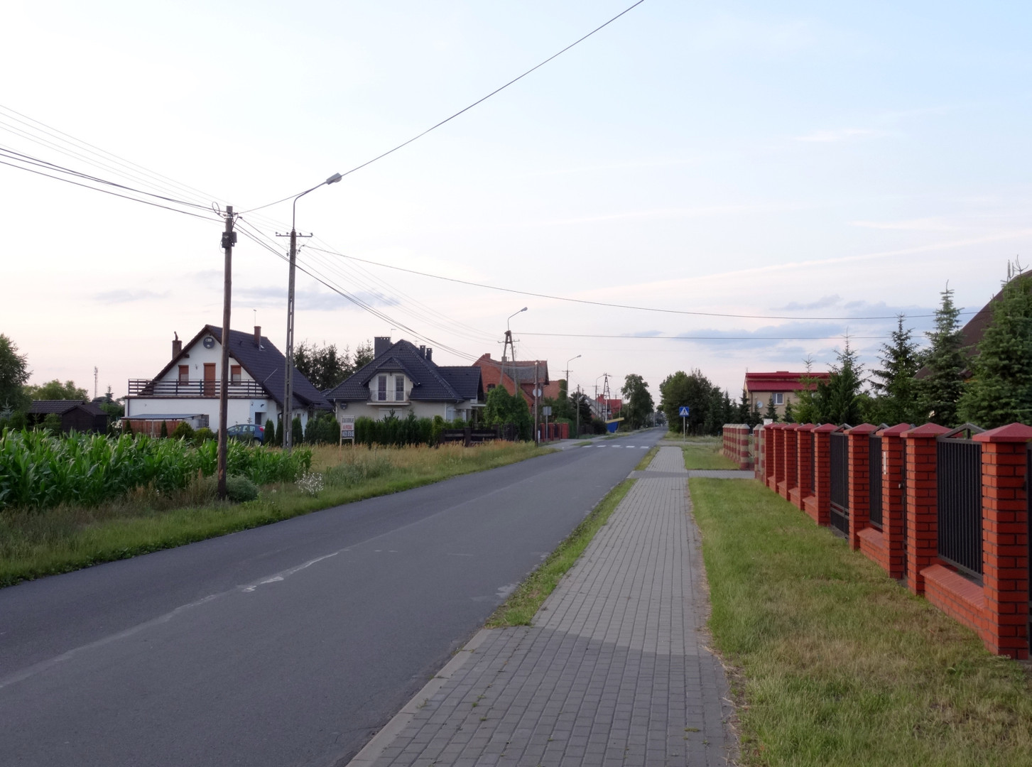 Dziemionna, gmina Nowa Wieś Wielka, powiat bydgoski